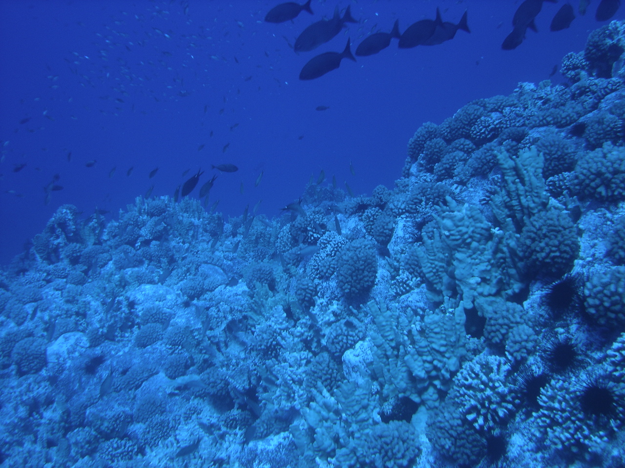 Fotos obtenidas durante la expedición que Oceana, National Geographic y la Armada de Chile realizaron en febrero al Parque Marino Motu Motiro Hiva.